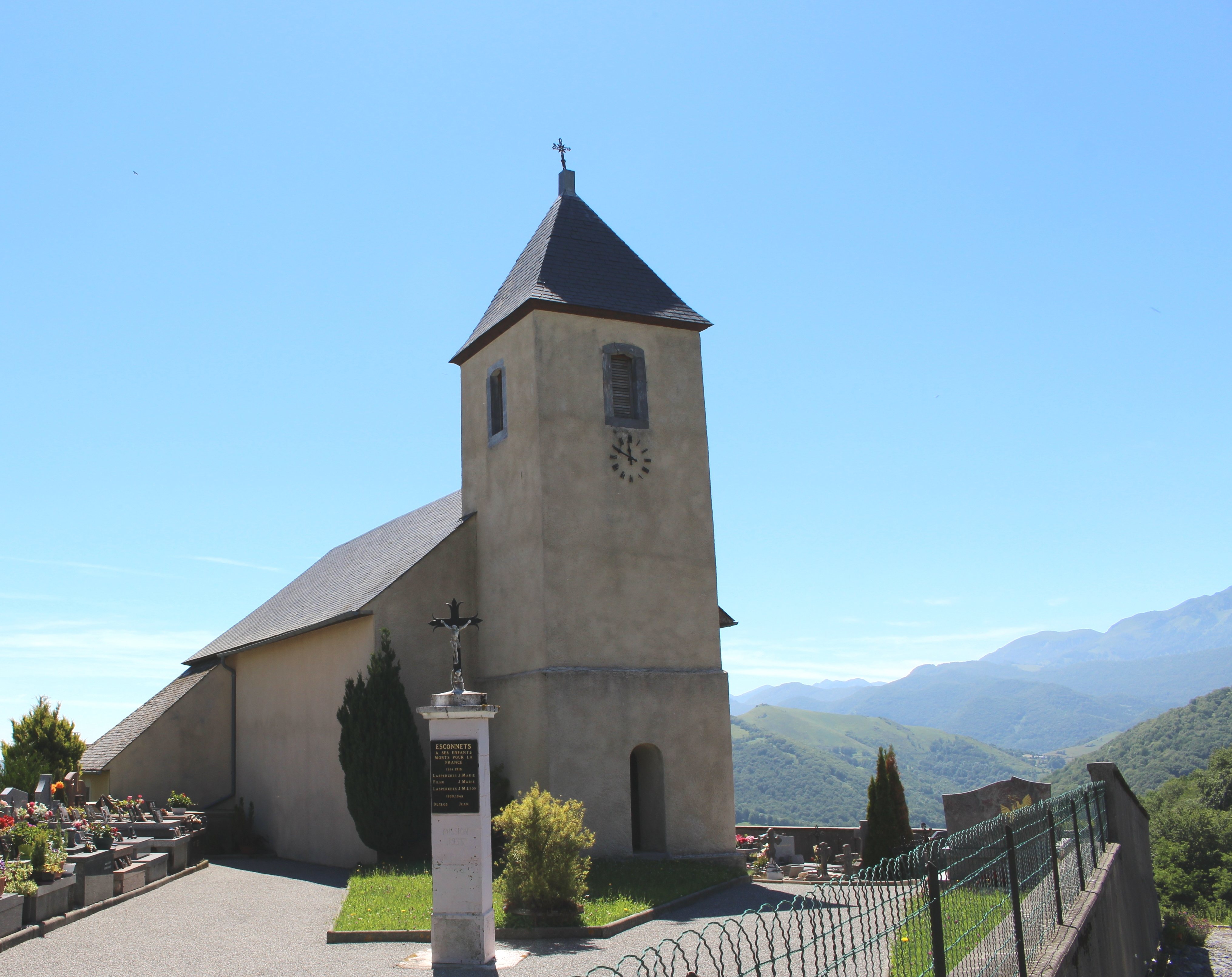 Église Saint-Jacques d'Esconnets (Hautes-Pyrénées)